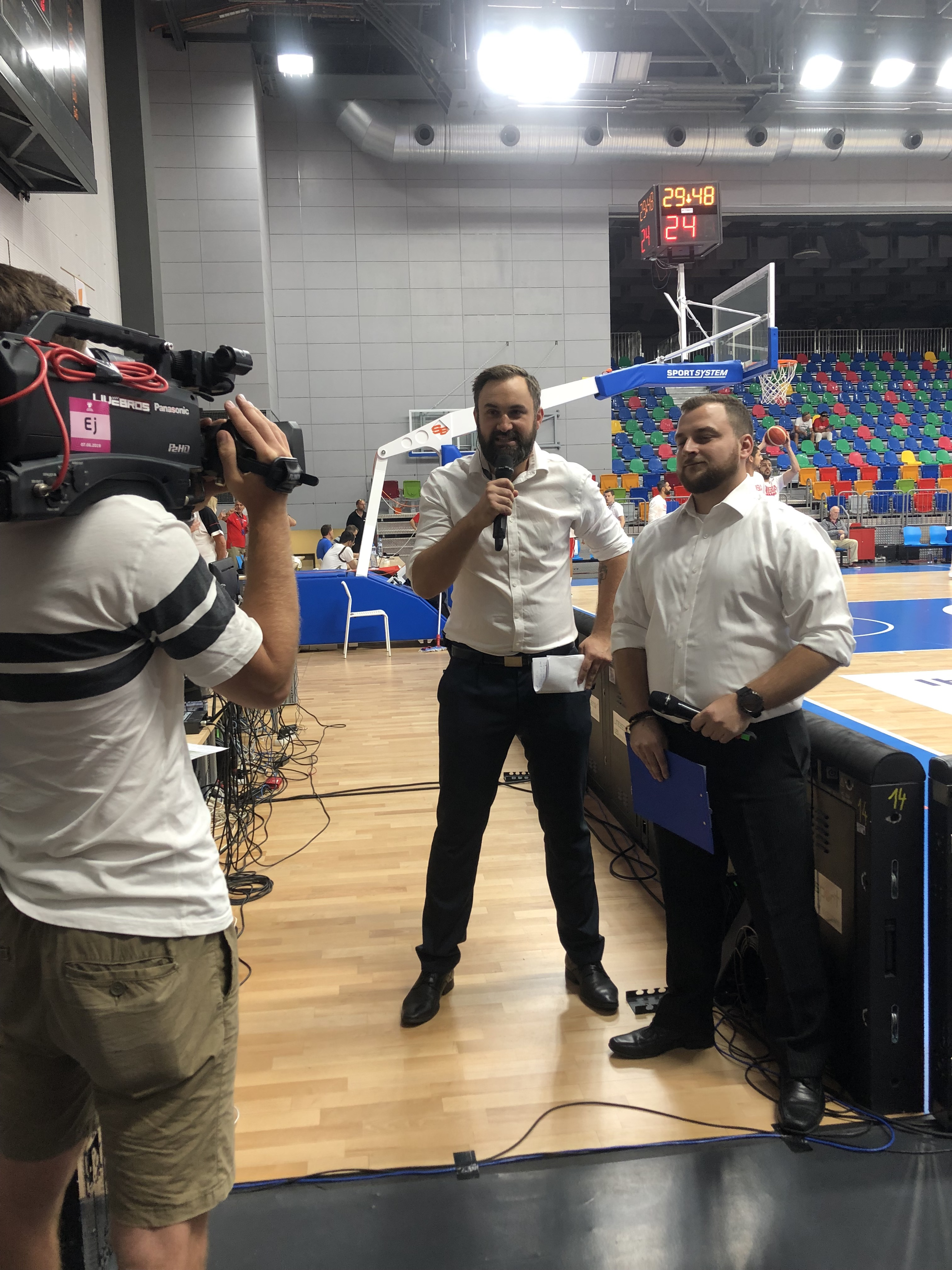 hala Královka